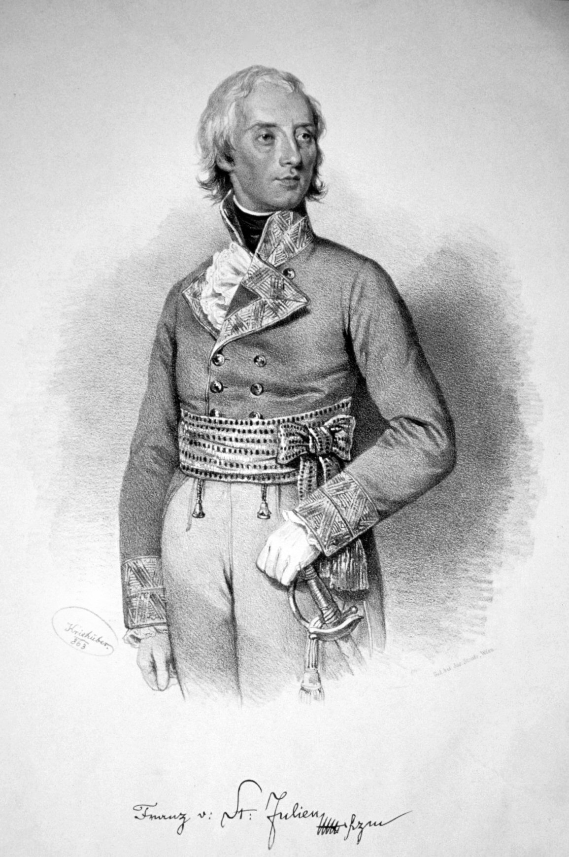 Franz Seraph Saint-Julien (1756-1836), Graf, k. k. Kämmerer, Obersterbland-Falkenmeister, Feldzeugmeister. Lithographie von Josef Kriehuber, 1853